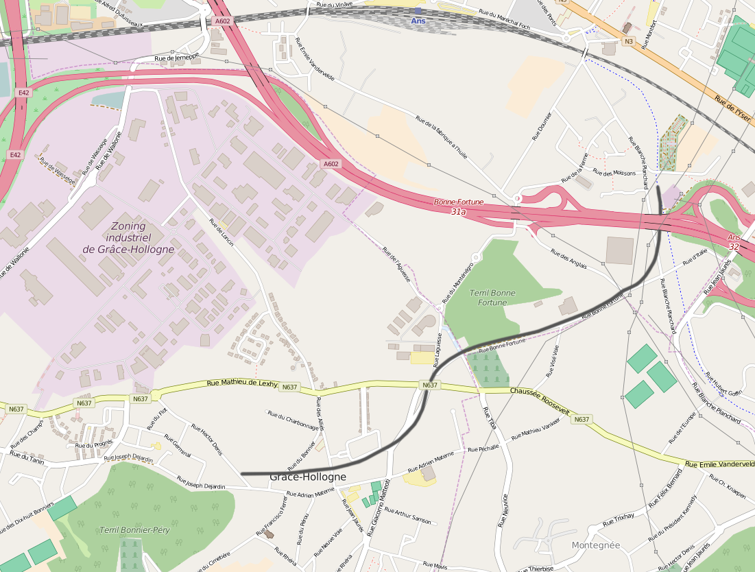 Belgian Railway Line 213, Ans-Plateau - Bonne Fortune en Bonnier mines